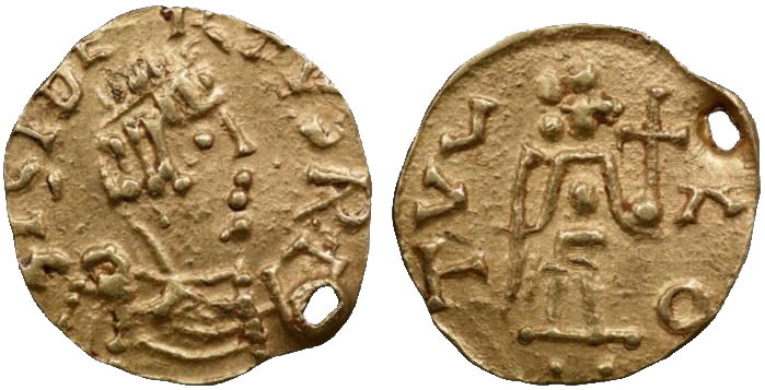 Tiers de sou de Sigebert Ier frappé à Toul. BNF, monnaies, médailles et antiques. Avers : Buste diadémé à droite. Revers : Victoire à droite tenant un globe crucigère ; à l'exergue, deux points.